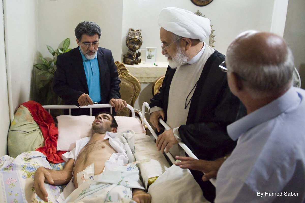 کروبی در دیدار با اسیب دیدگان بعد از انتخابات 1388